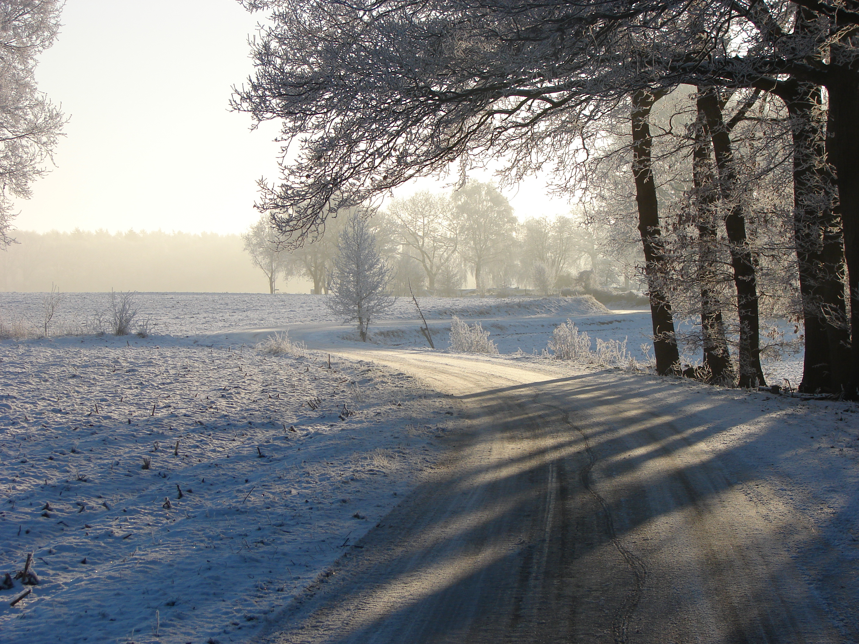 Heidenhoekweg in the snow